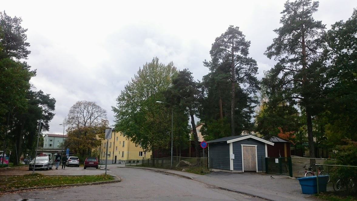 Ulricehamnsvägen sedd från parkeringen vid Hammarbyhöjdens IP 2017.